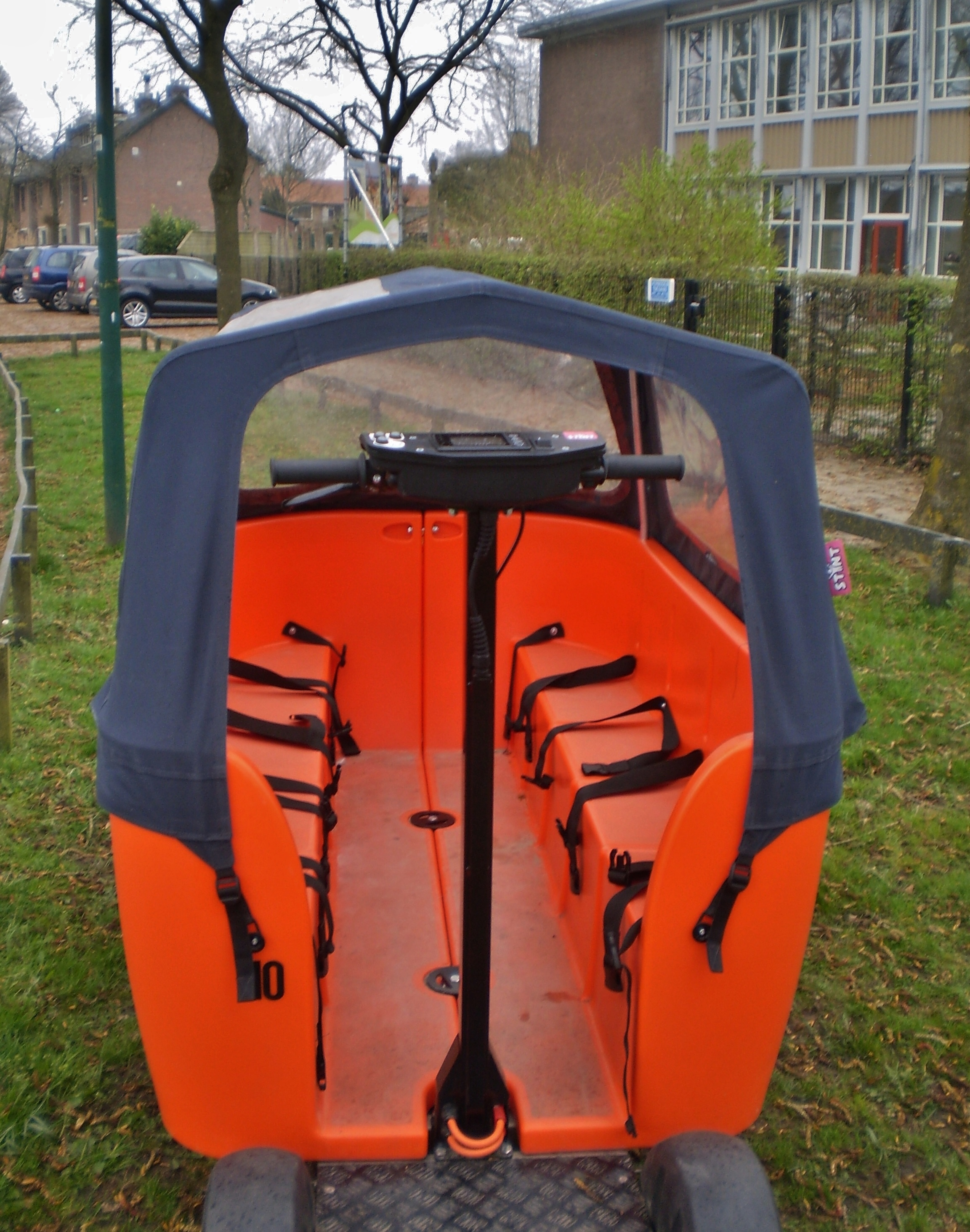 achteraanzicht